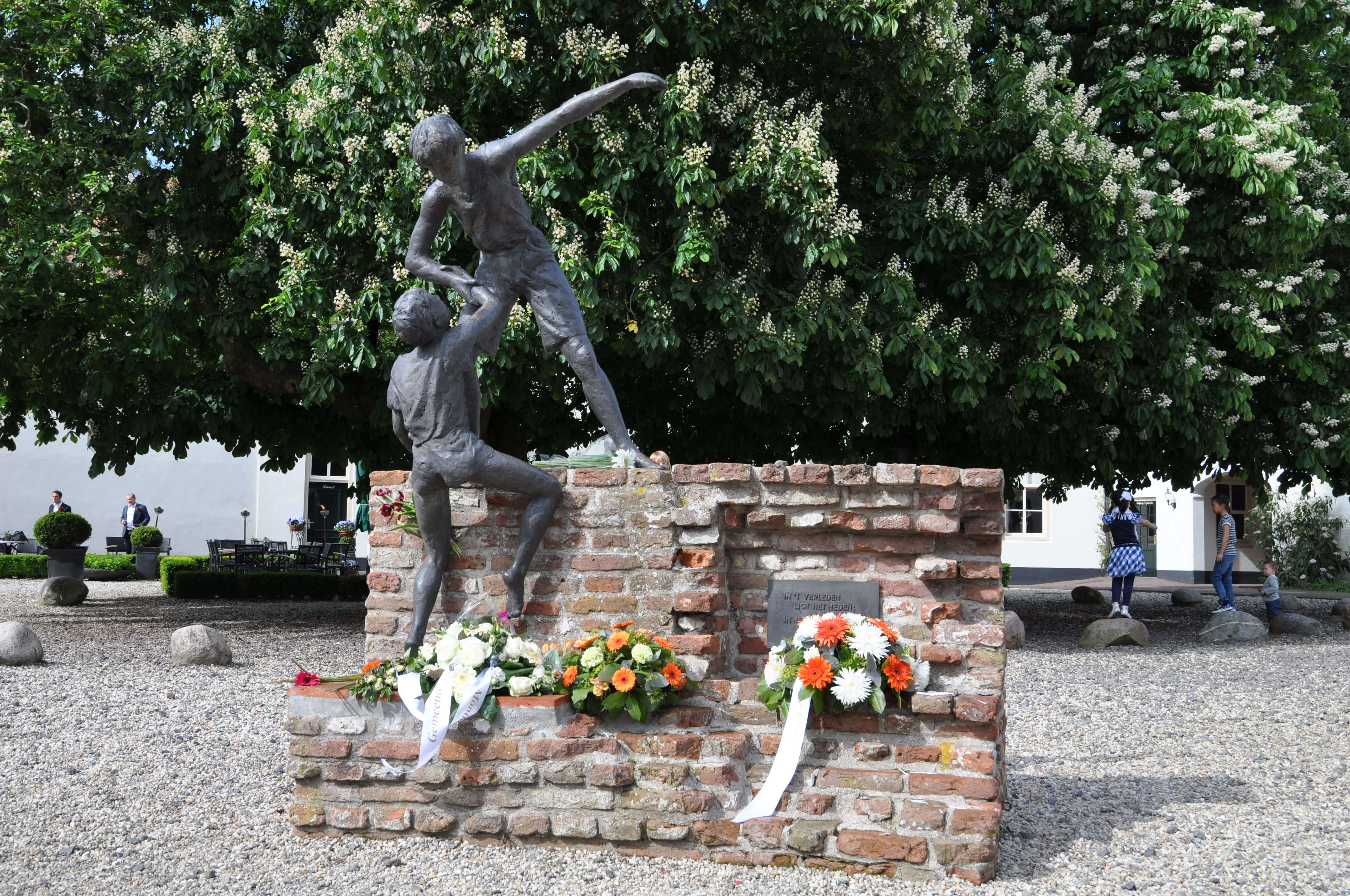 De handreiking (Margriet Barends), Montfoort.